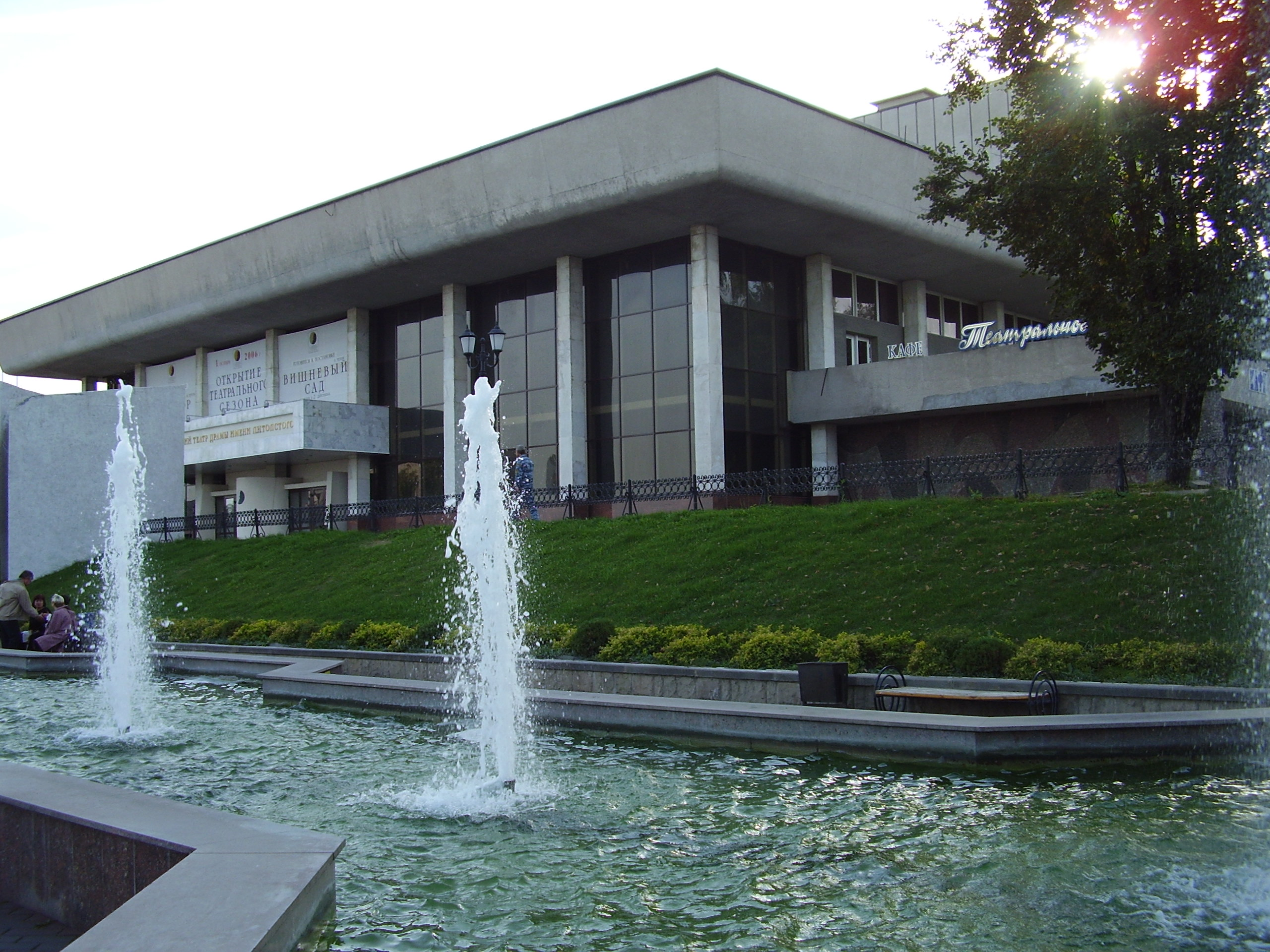 Липецк,фонтан у драмтеатра